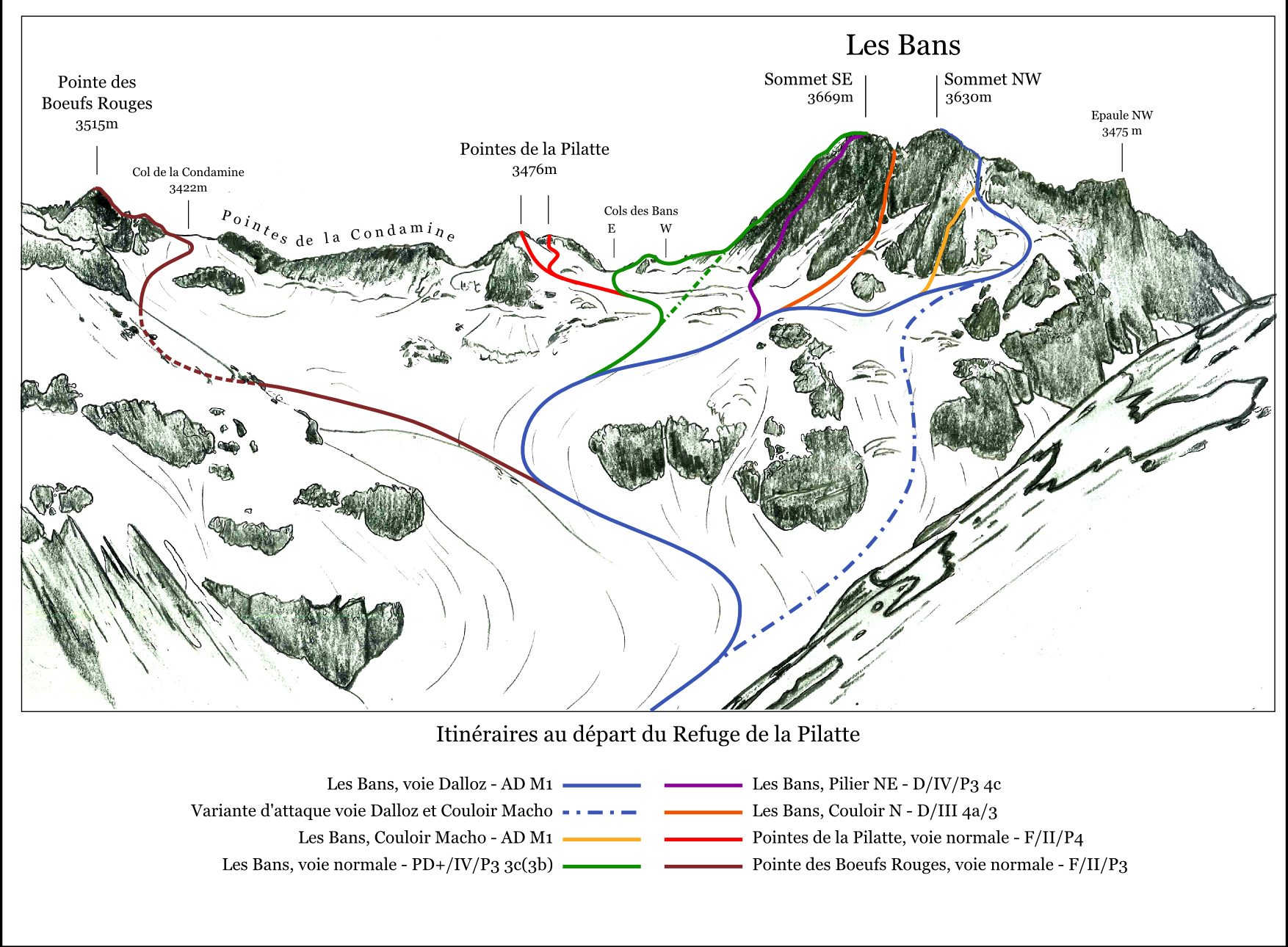 Itinerari alpinistici in partenza dal Refuge de la Pilatte - Massiccio des Écrins